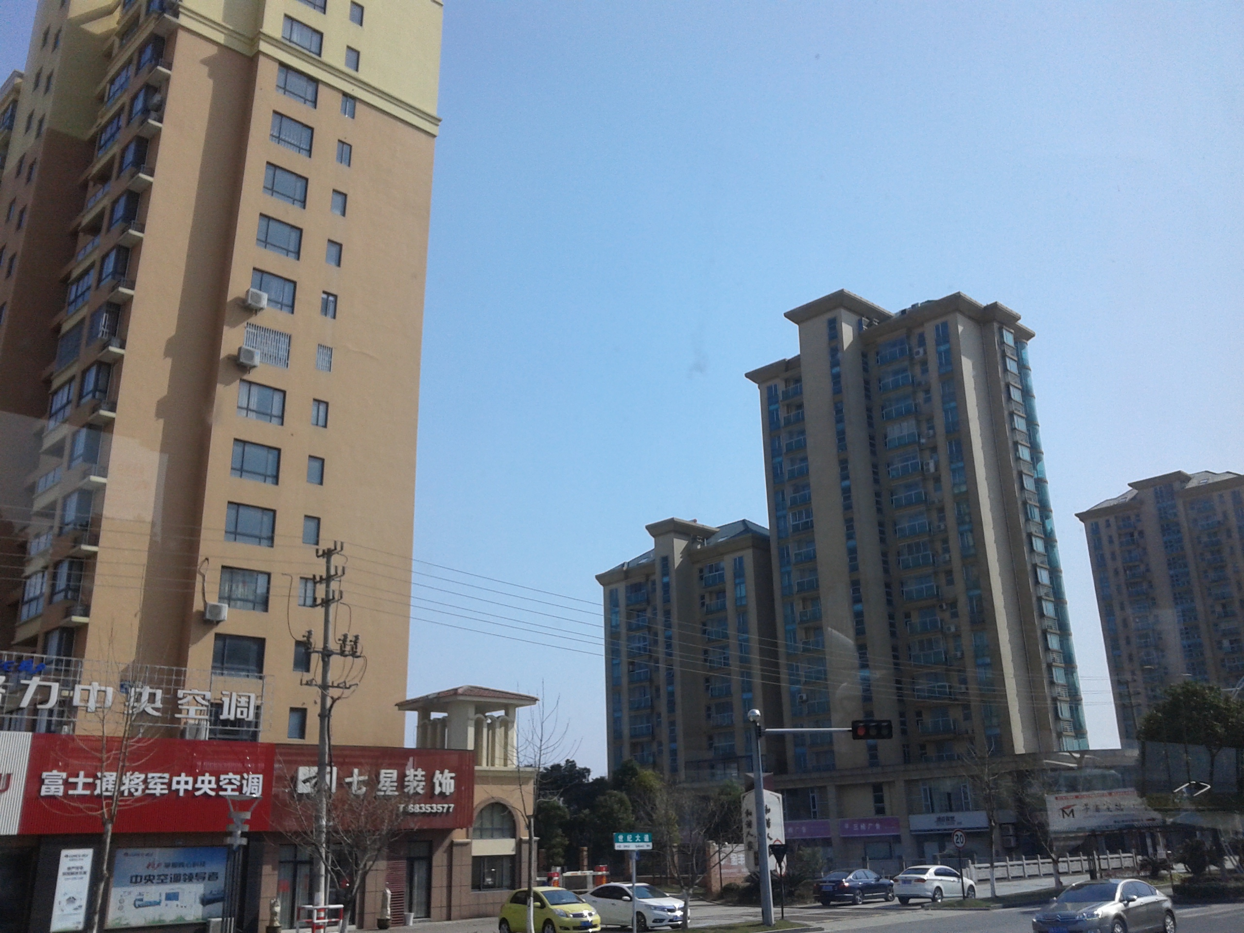 浙江 桐鄉市 Tongxiang City